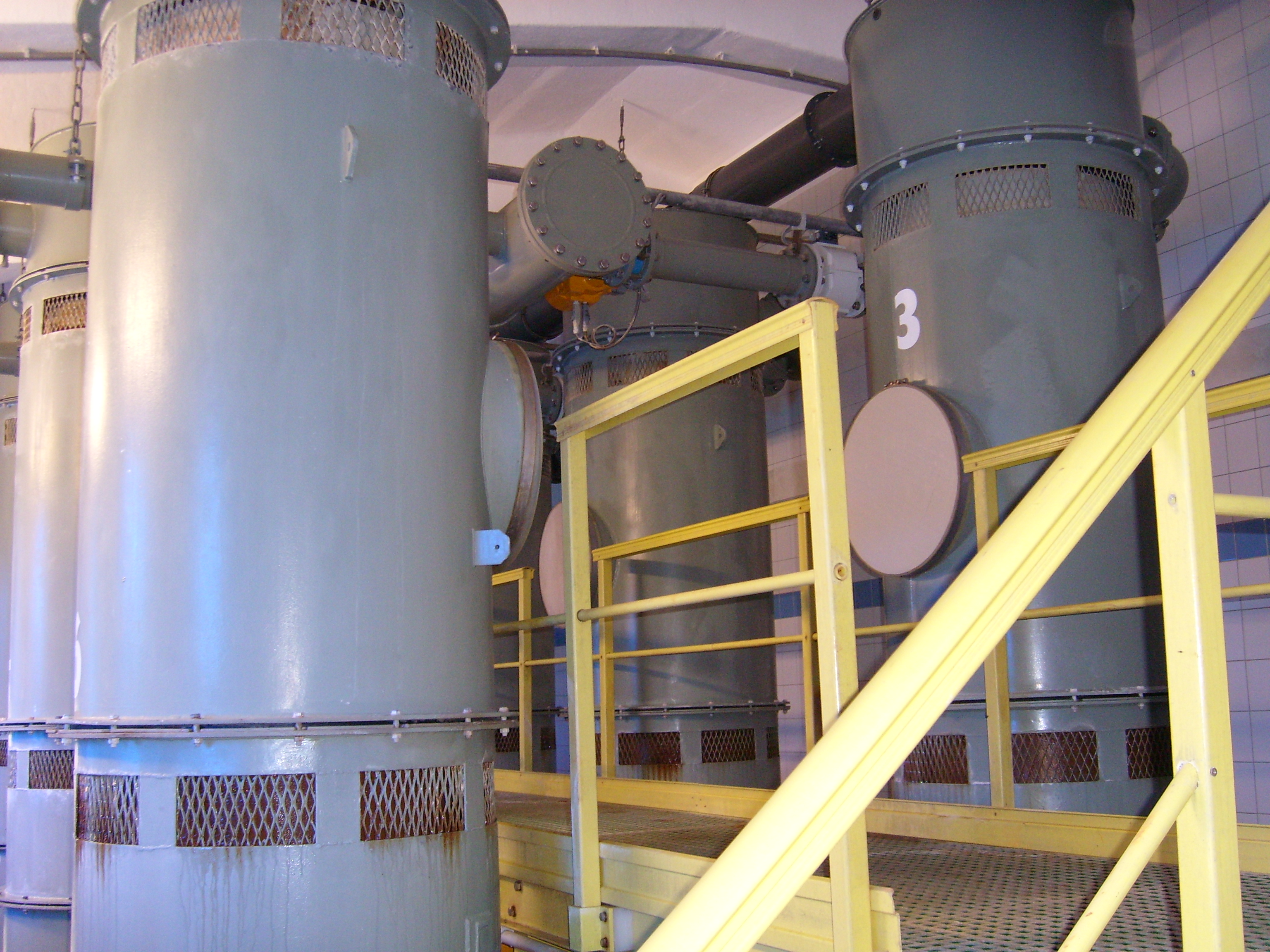 Filter, Wasserwerk Groß Schönwalde